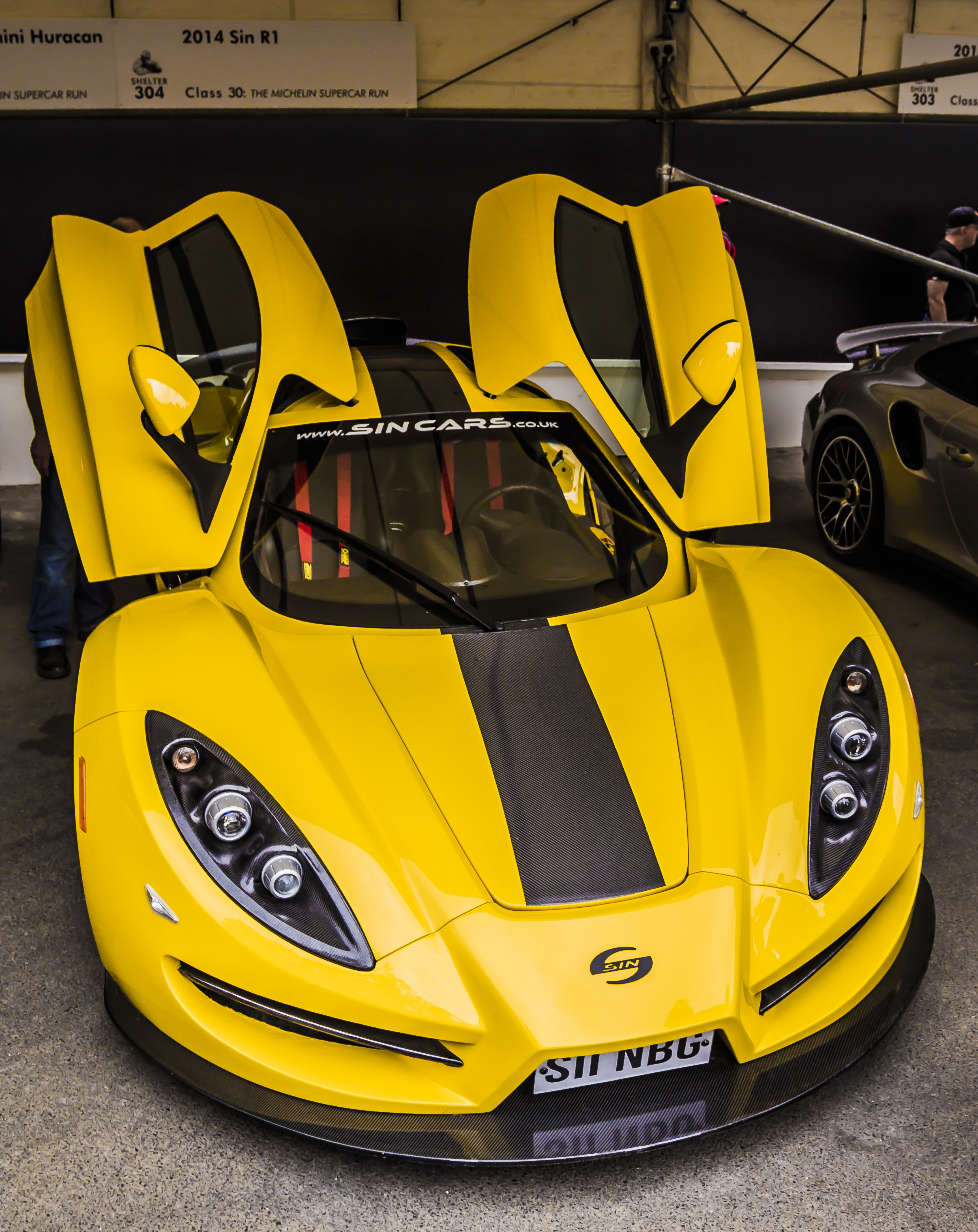 SIN R1